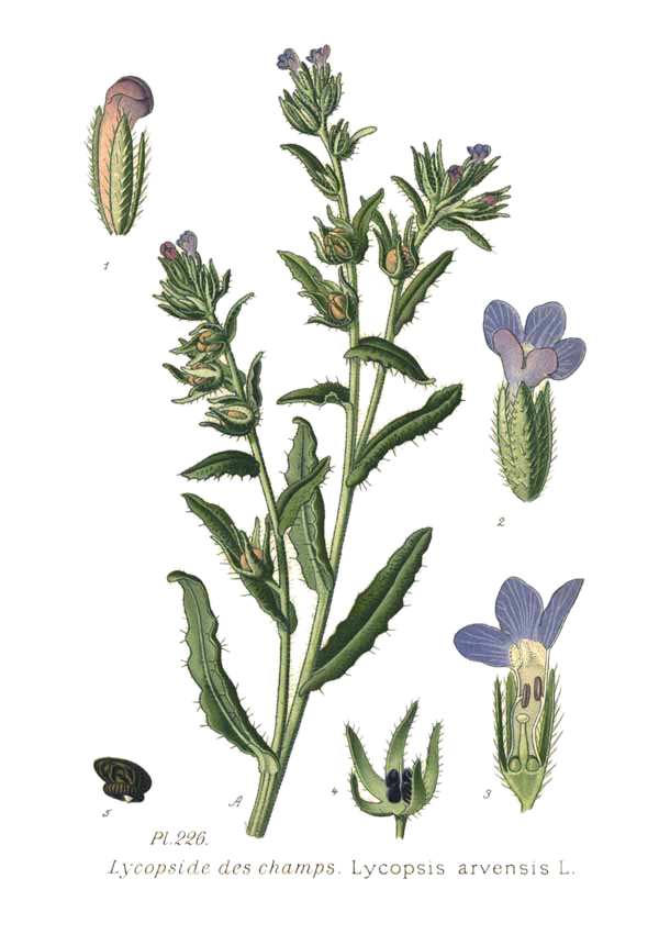 Lycopsis arvensis L.